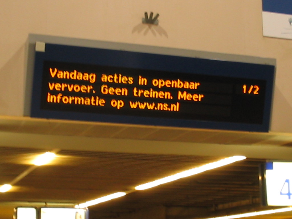 OV staking 13 oktober 2004